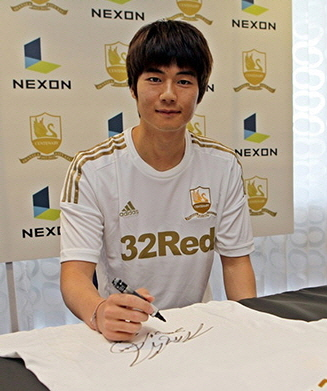 넥슨-스완지 시티 공식 후원식에서의 기성용